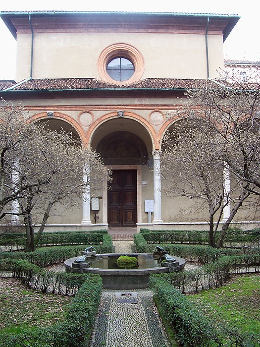 Chiostro della chiesa di Santa Maria delle Grazie a Milano.